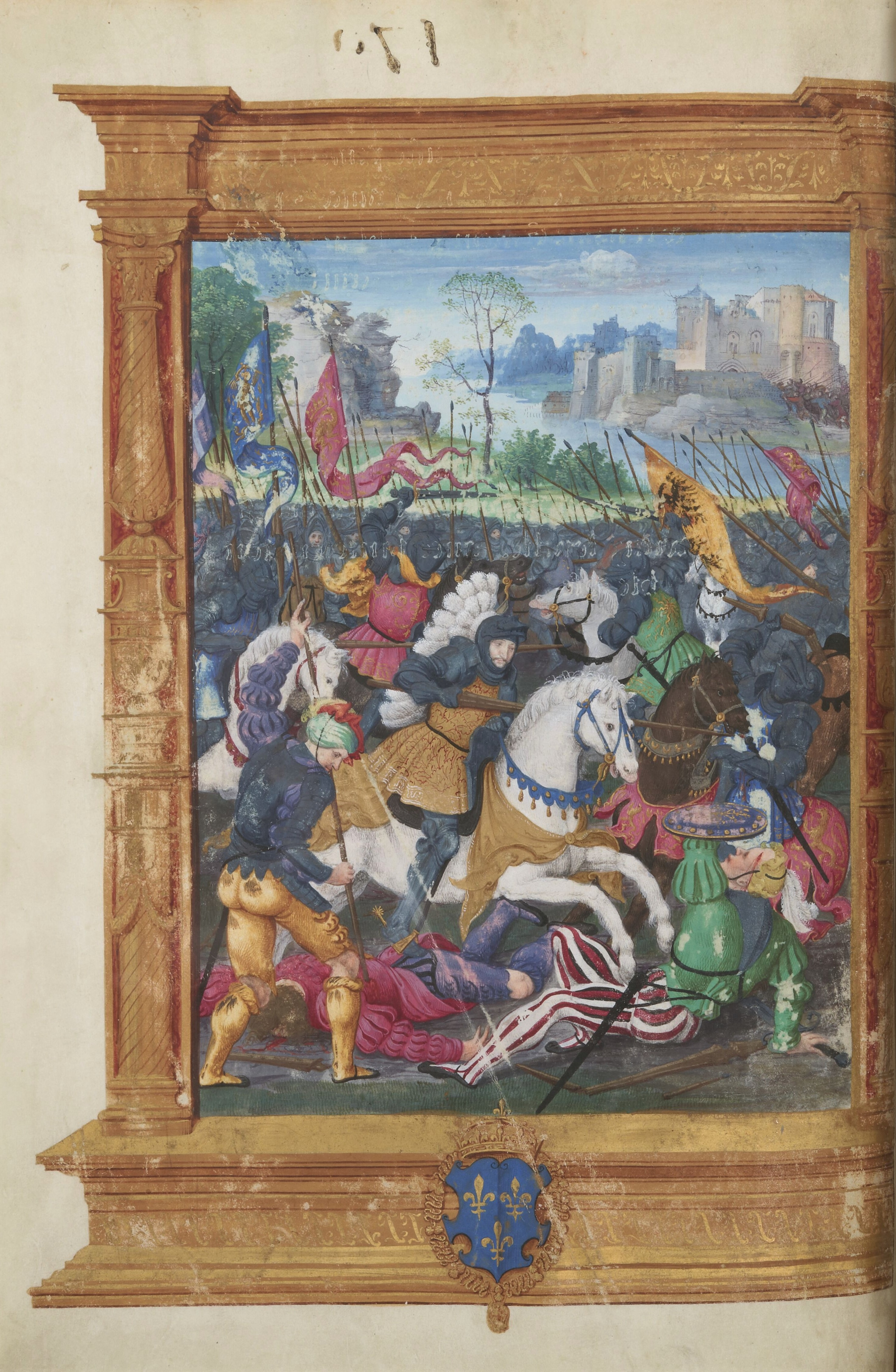 François Ier, Marignano